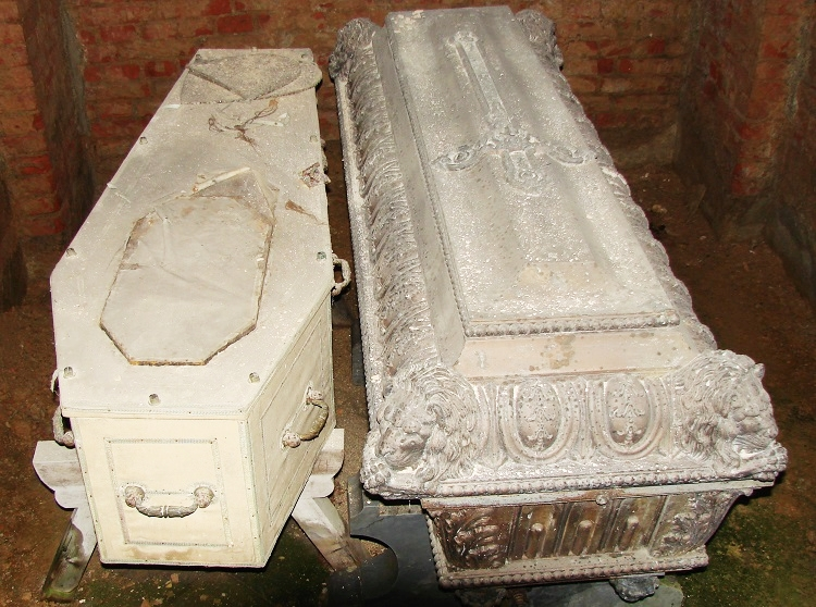 Trumny księcia Józefa Marii Sułkowskiego (z prawej) i Luizy Vecseghy (z lewej) w krypcie kaplicy w Feistritz am Wechsel